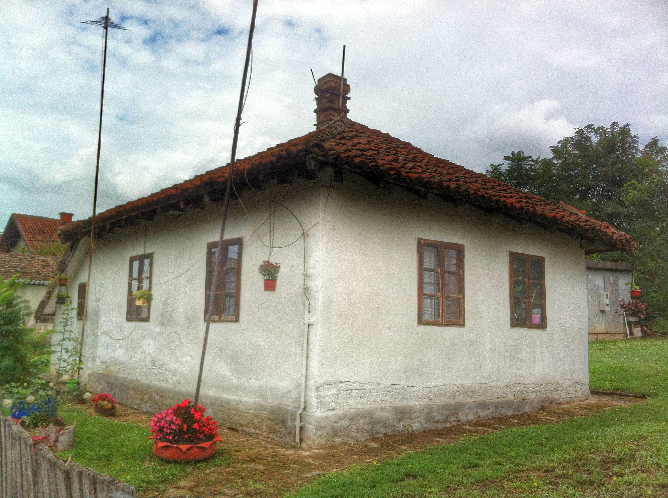 Српски (ћирилица): Поглед са улице Јована Цвијића.